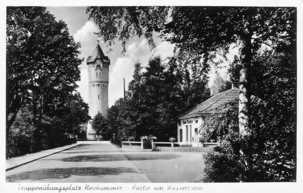 Neuhammer am Queis (heute Świętoszów), Truppenübungsplatz, Partie am Wasserturm